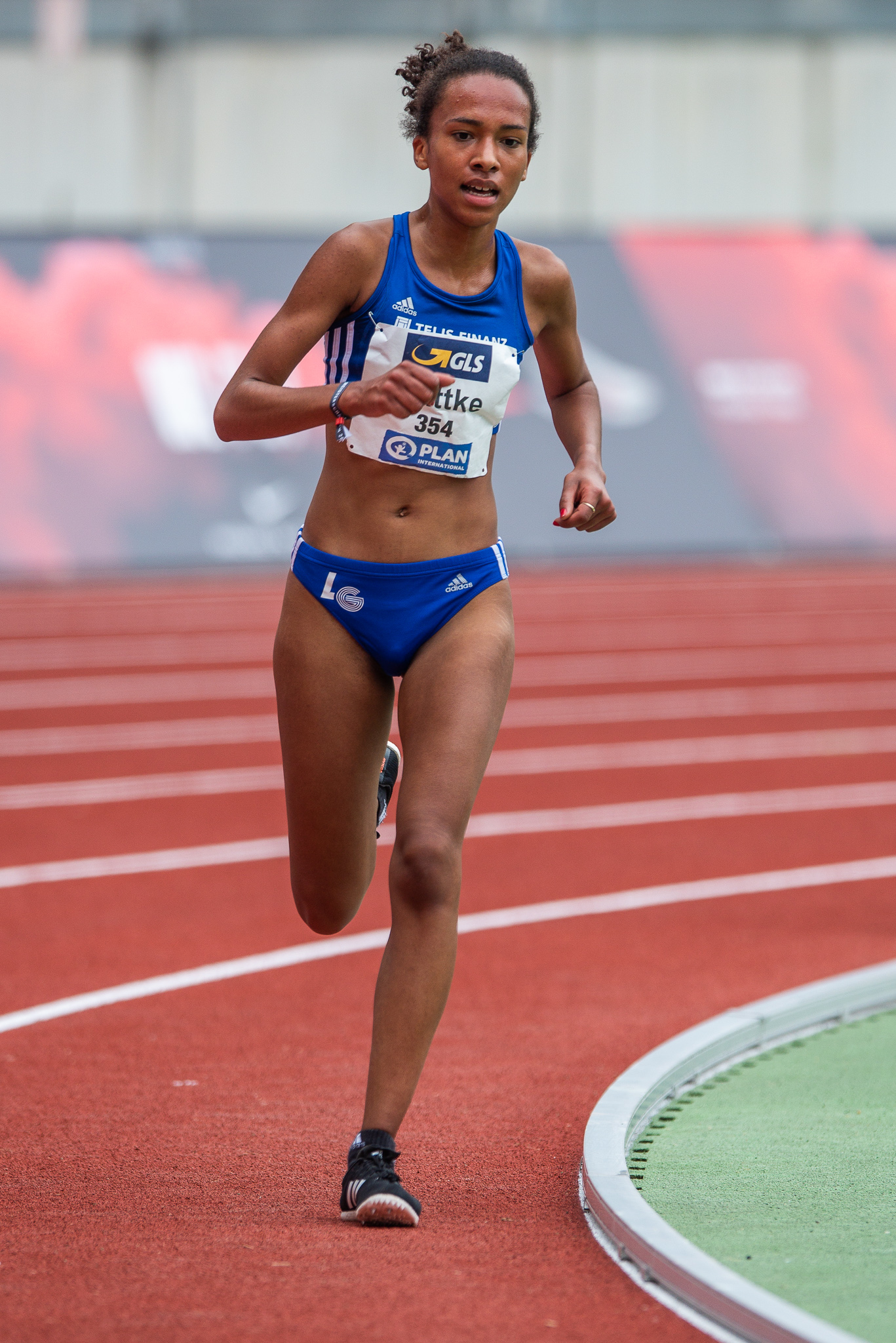 5000-Meter-Lauf,DLV,Deutsche Leichtathletik Meisterschaften 2018,Deutscher Leichtathletik-Verband,Miriam Dattke,Max-Morlock-Stadion,LG Telis Finanz Regensburg